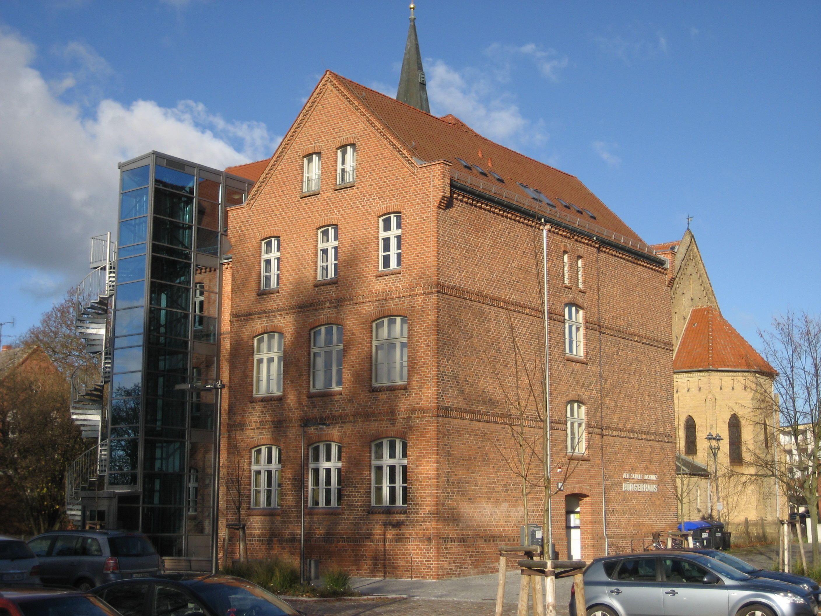 Bürgerhaus Löcknitz (Alte Schule) in der Marktstraße 4 aus Blickrichtung Südosten am 25. November 2013.